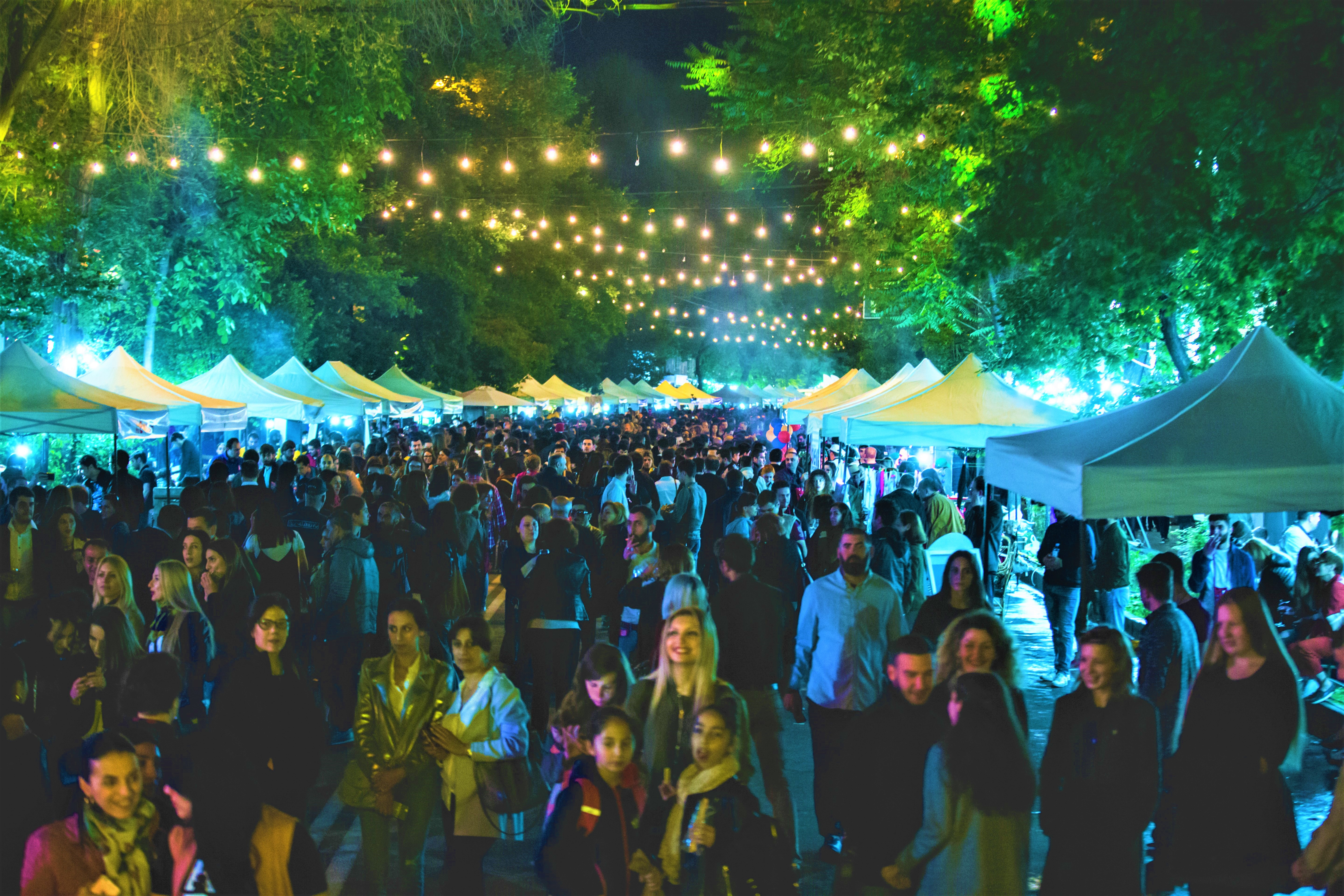 Երևանի Գինու Օրեր, Սարյան փողոց